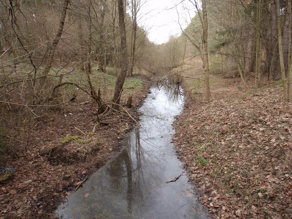 Kalmistu kraav